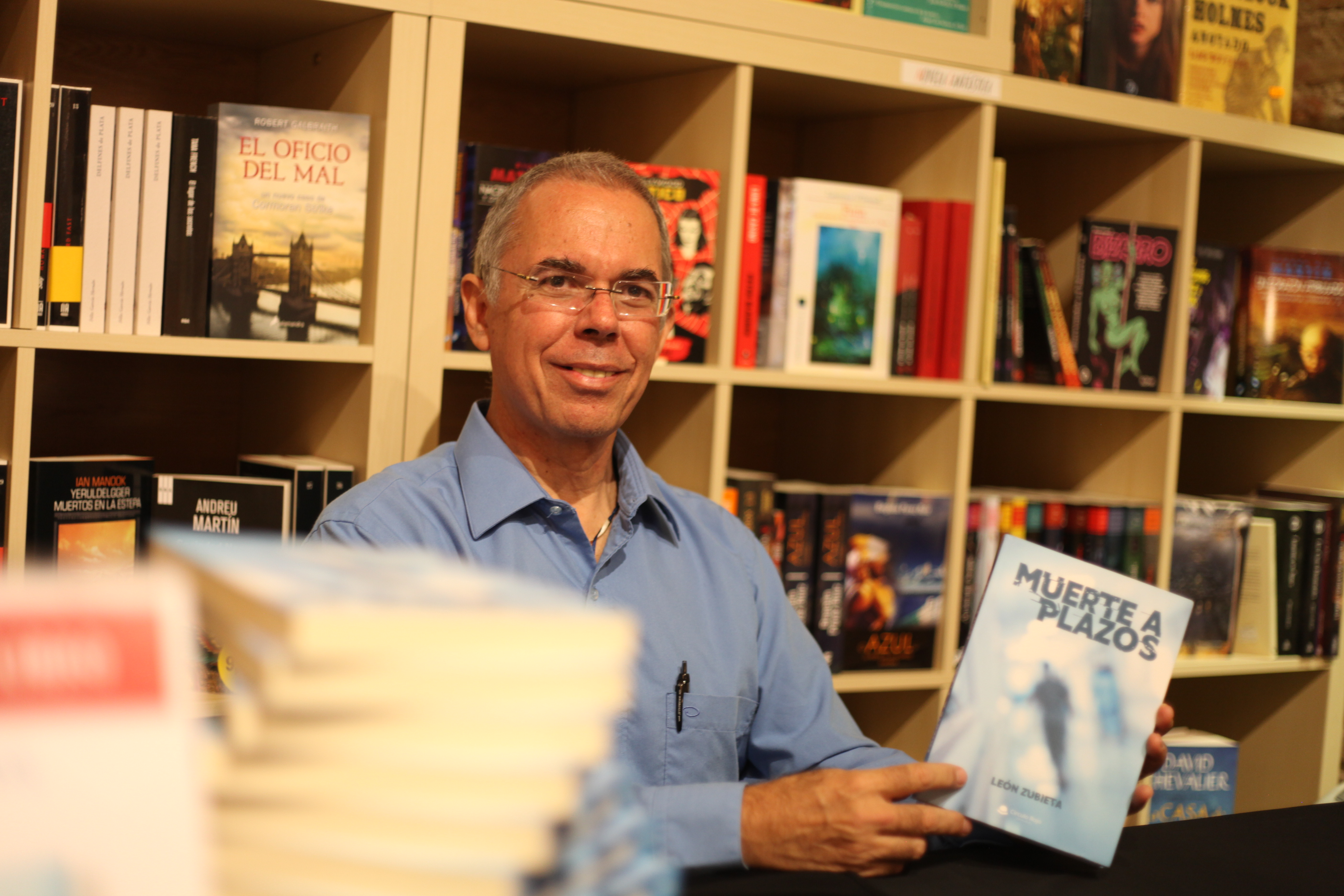 León Zubieta presentando su novela Muerte a plazos en Madrid